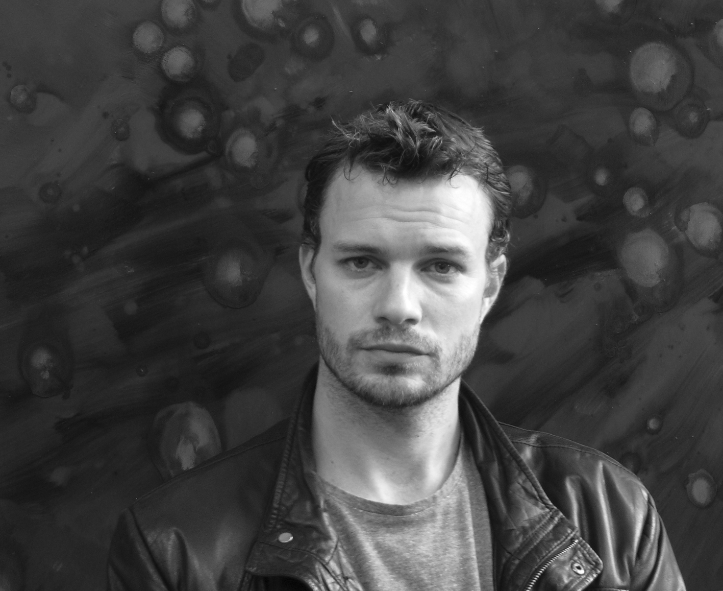 Julian Khol(*1979 in Wien) ist ein österreichischer bildender Künstler.